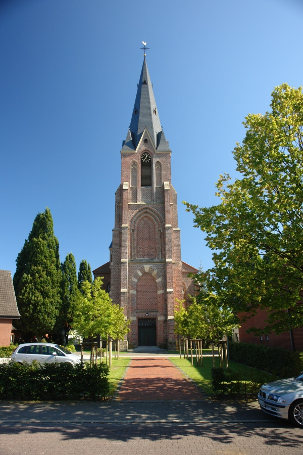 Blick auf den Kirchturm der Kirchengemeinde St. Silvester in Erle